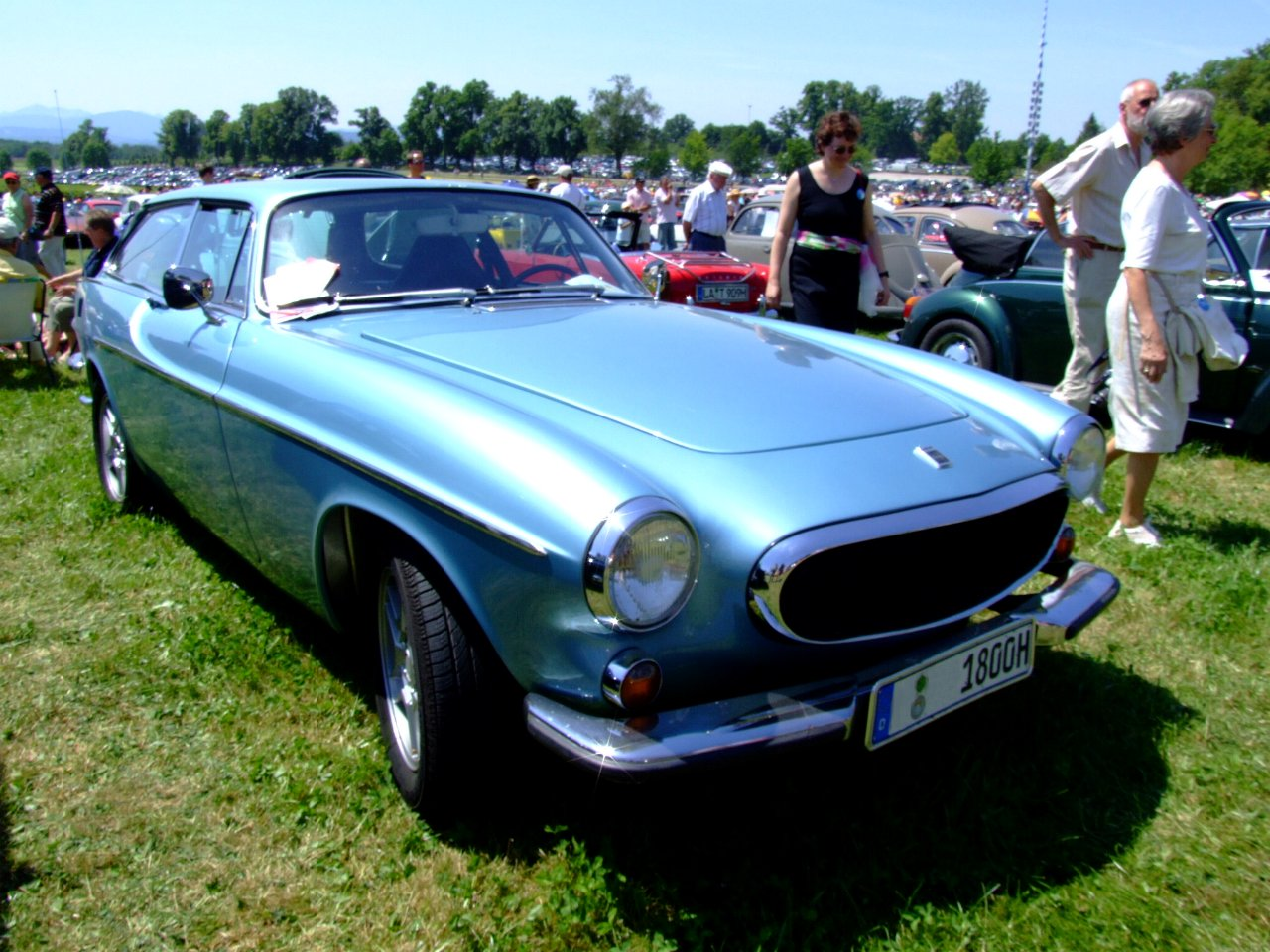 Volvo 1800 ES